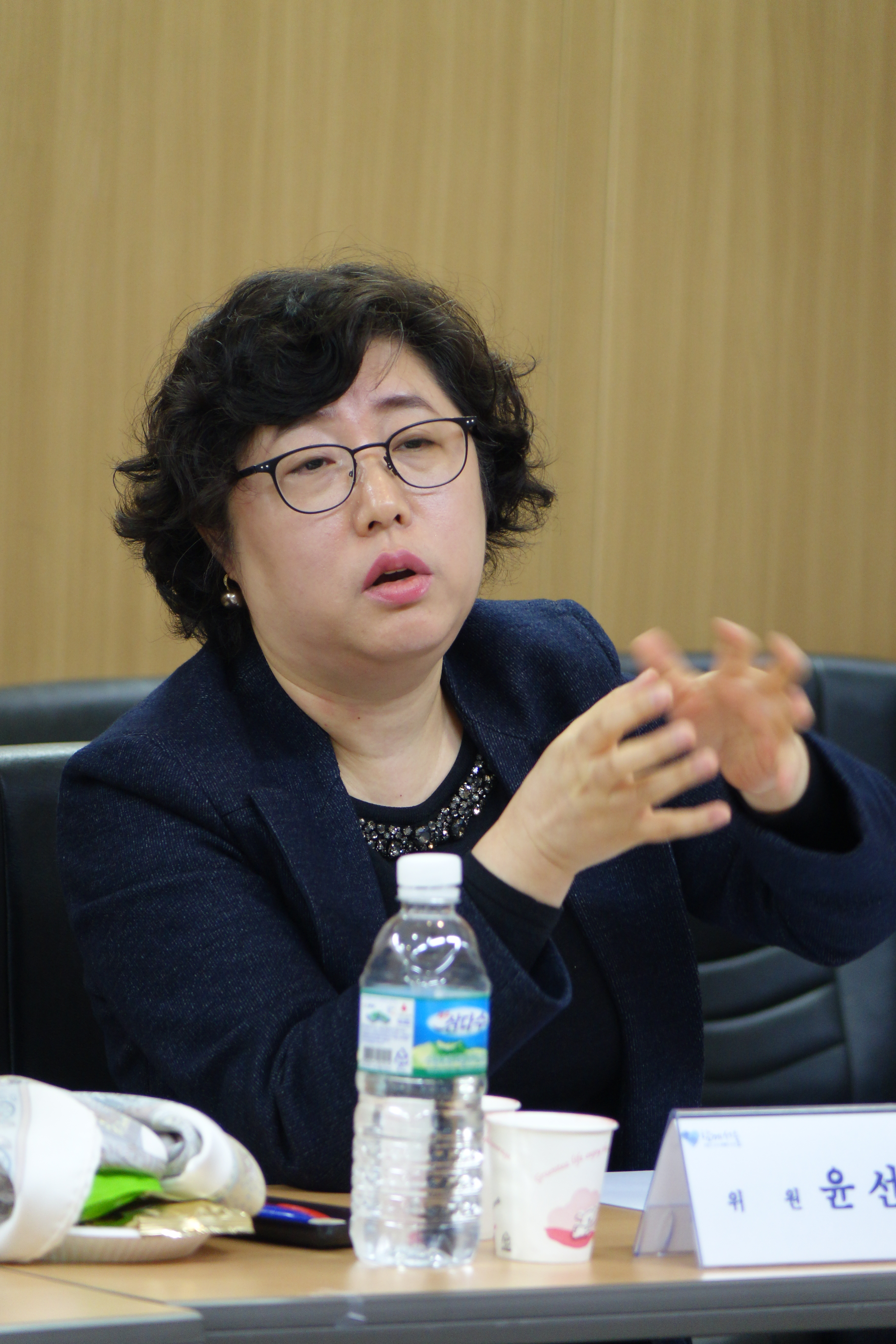 20150327시민안전파수꾼 자문회의